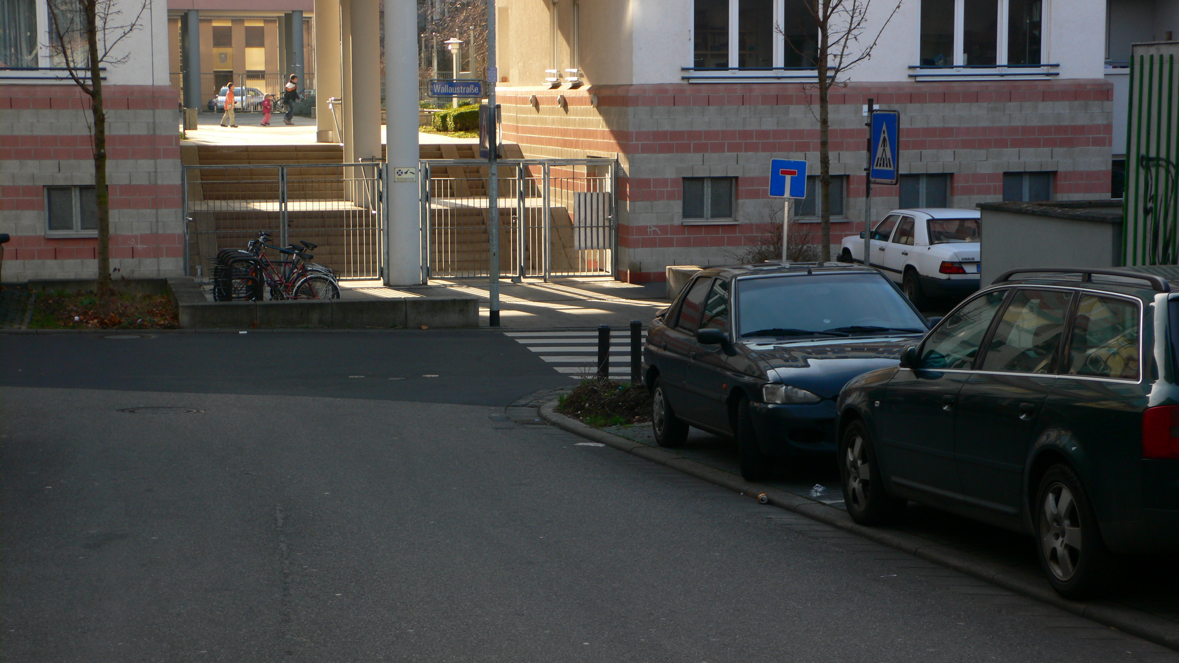 Niedrigeres Straßenniveau in der Mainzer Wallaustraße